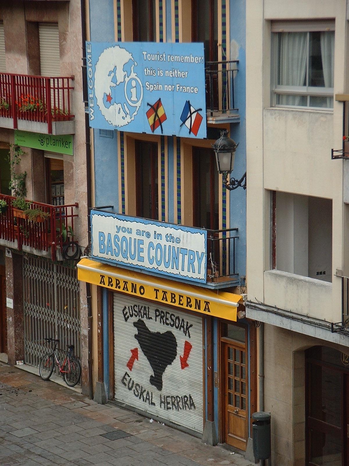 « Bienvenue. Touristes, souvenez-vous : Ce n'est ni l'Espagne, ni la France. Vous êtes au Pays basque. » (à Zarautz au Guipuscoa) - En jaune et noir: Arrano tarberna signifie en basque « La taverne de l'aigle », faisant référence à l'Arrano beltza. Les Herriko Tabernak ou Tavernes du Pays sont des lieux que l'on trouve partout dans les 7 provinces et qui affichent ouvertement les revendications indépendantistes. Cependant, toute personne y est conviée comme dans tout bar. - Sur la porte : Euskal presoak euskal herrira signifie en basque « Les prisonniers basques (doivent être dans les prisons) au Pays basque ». C'est la revendication d'un droit légitime qui demande que tout prisonnier doit être incarcéré au plus près de son lieu de résidence; ce qui n'est absolument pas le cas des prisonniers basques qui subissent dispersion et éloignement.